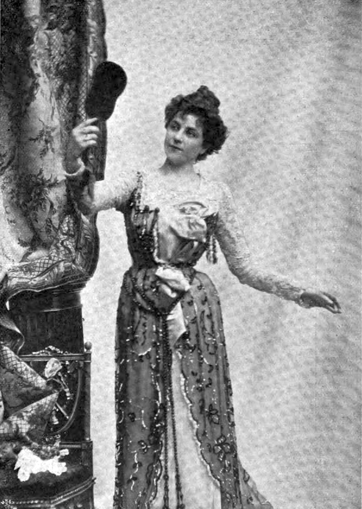 Annie Kalmar (1877–1901), German actress